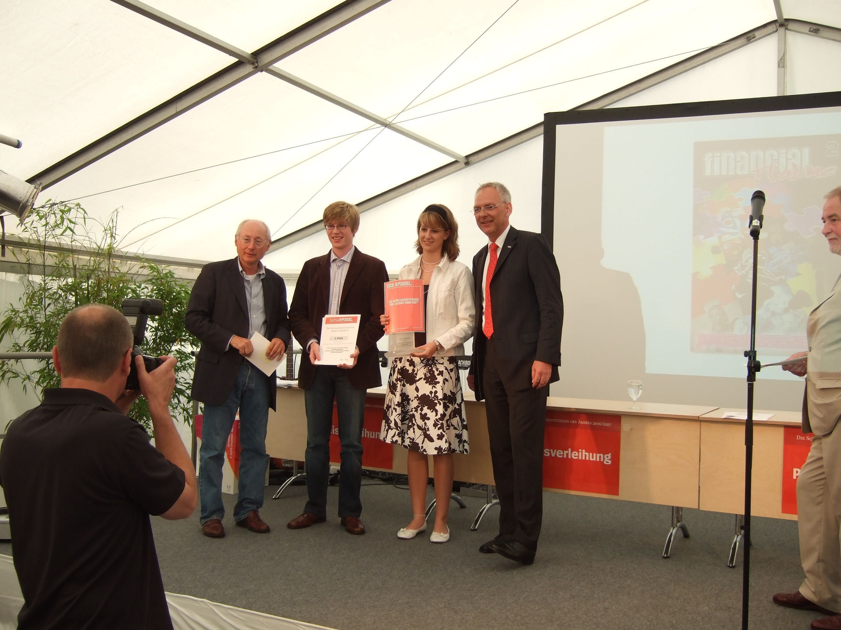 Sonderpreis "Energie" für die Financial T(’a)ime, Schülerzeitung der Kaufmännischen Schule Tauberbischofsheim, beim Spiegel-Schülerzeitungswettbewerb in Hamburg.